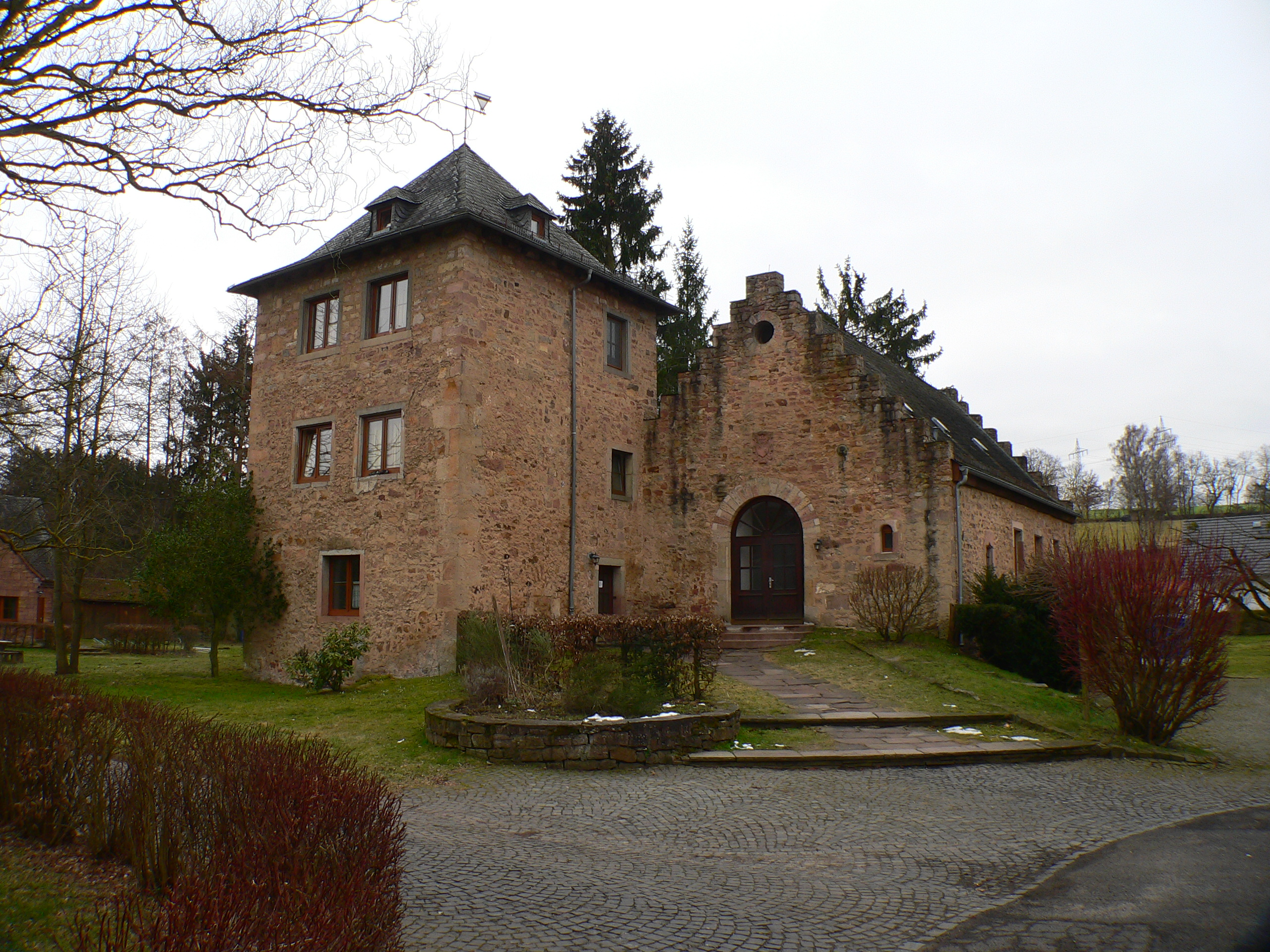 Schloss Hausen bei Bad Soden-Salmünster, Main-Kinzig-Kreis, Hessen.